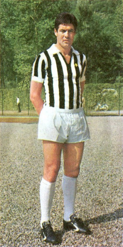 Il calciatore italiano Sandro Salvadore, capitano della Juventus, all'inizio della stagione 1970-71.